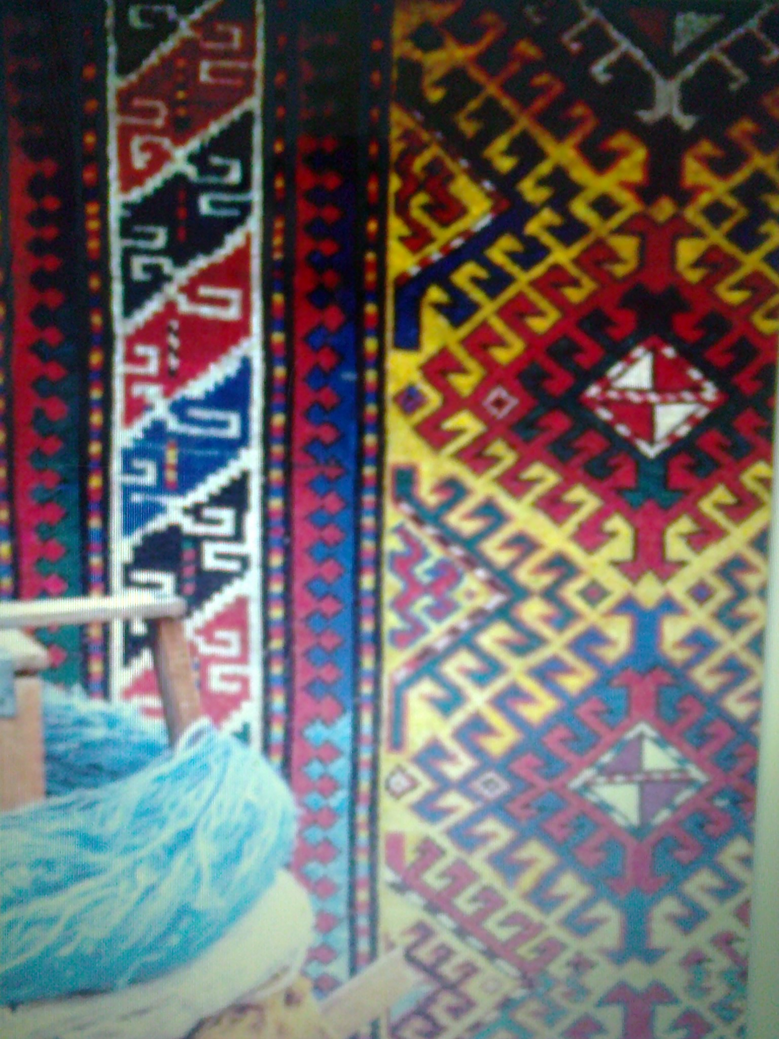 Xalça. Yun. Xovlu. 270x130.1850-ci il. Qax rayonu. İlisu kəndi.